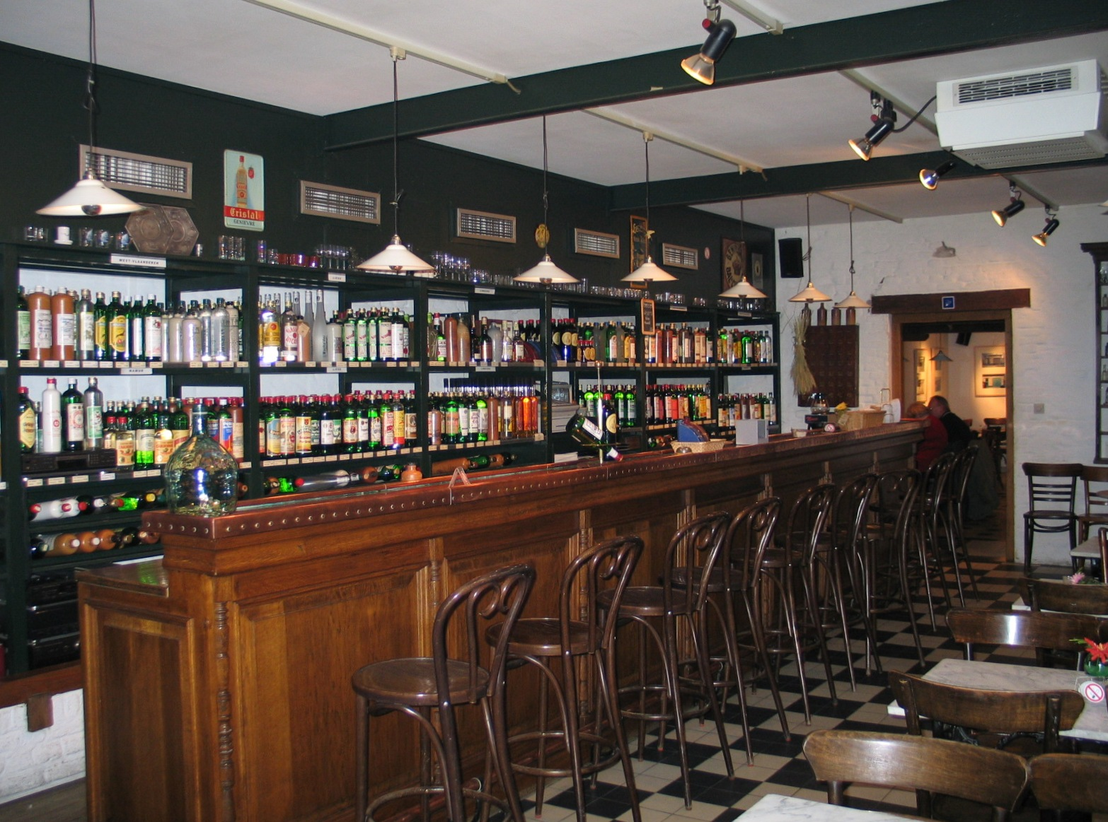 Proeflokaal in het Jenevermuseum van Hasselt - eigen foto